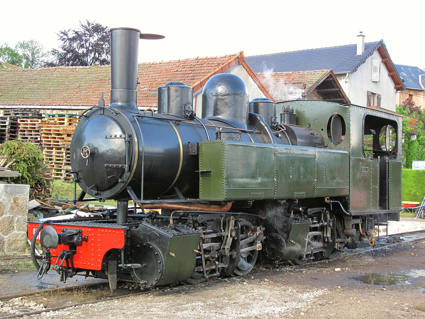 Première présentation au public de la Mallet n°101 POC en chauffe après restauration, à Tence (Haute-Loire) sur le chemin de fer touristique Voies Ferrées du Velay le 21 mai 2011.